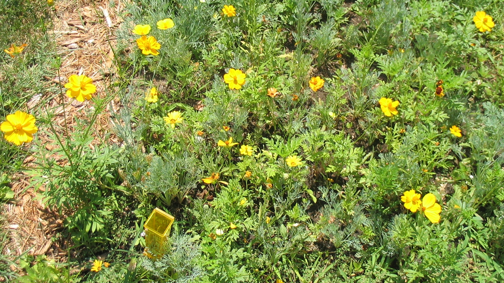 Xeriscaping.